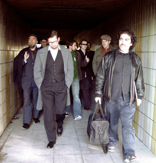 Mardi Gras.bb anno 2007